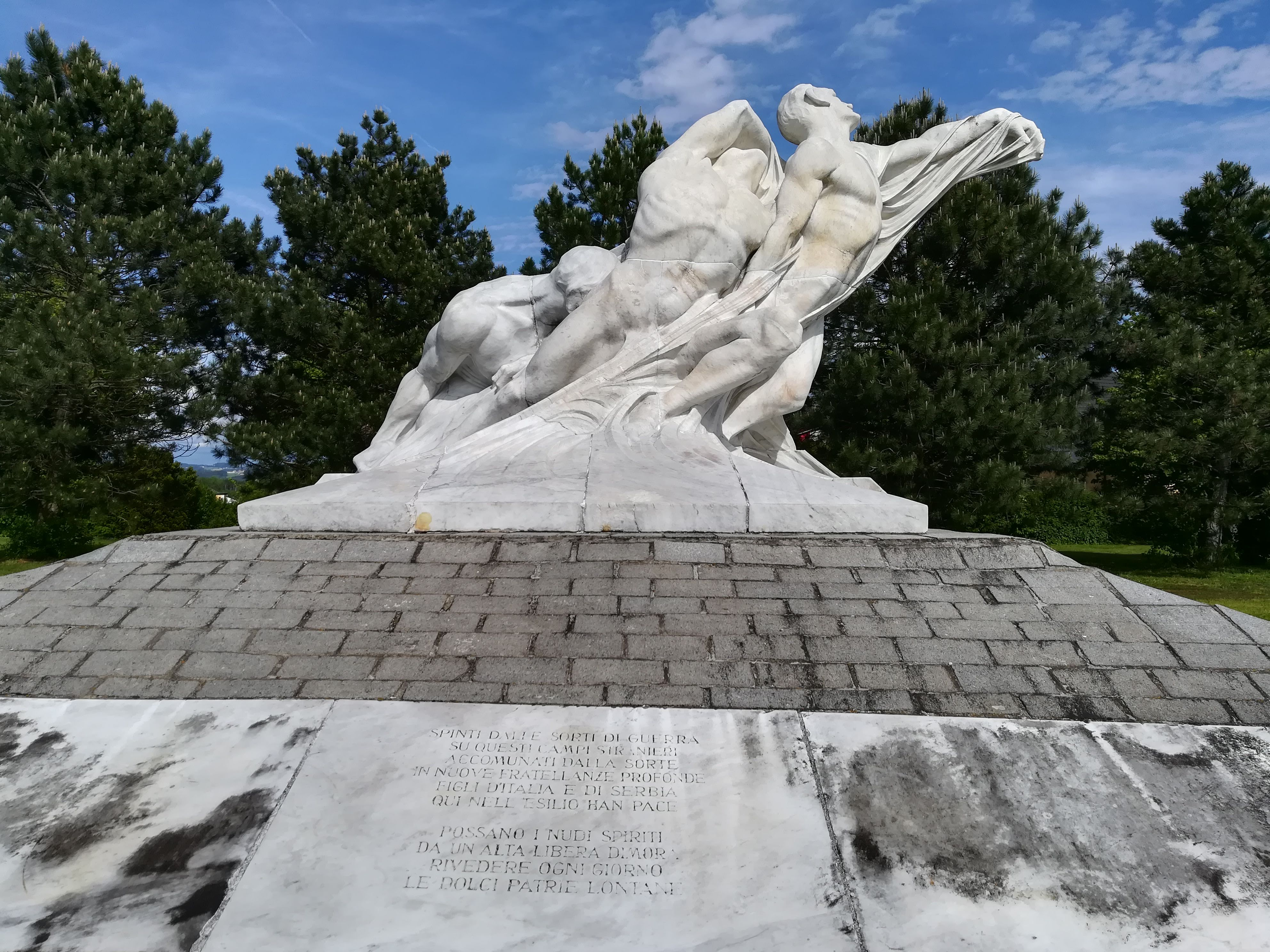 Monumento ai militari italiani caduti nella 1^ guerra mondiale e seppelliti nel cimitero militare italiano di Mauthausen